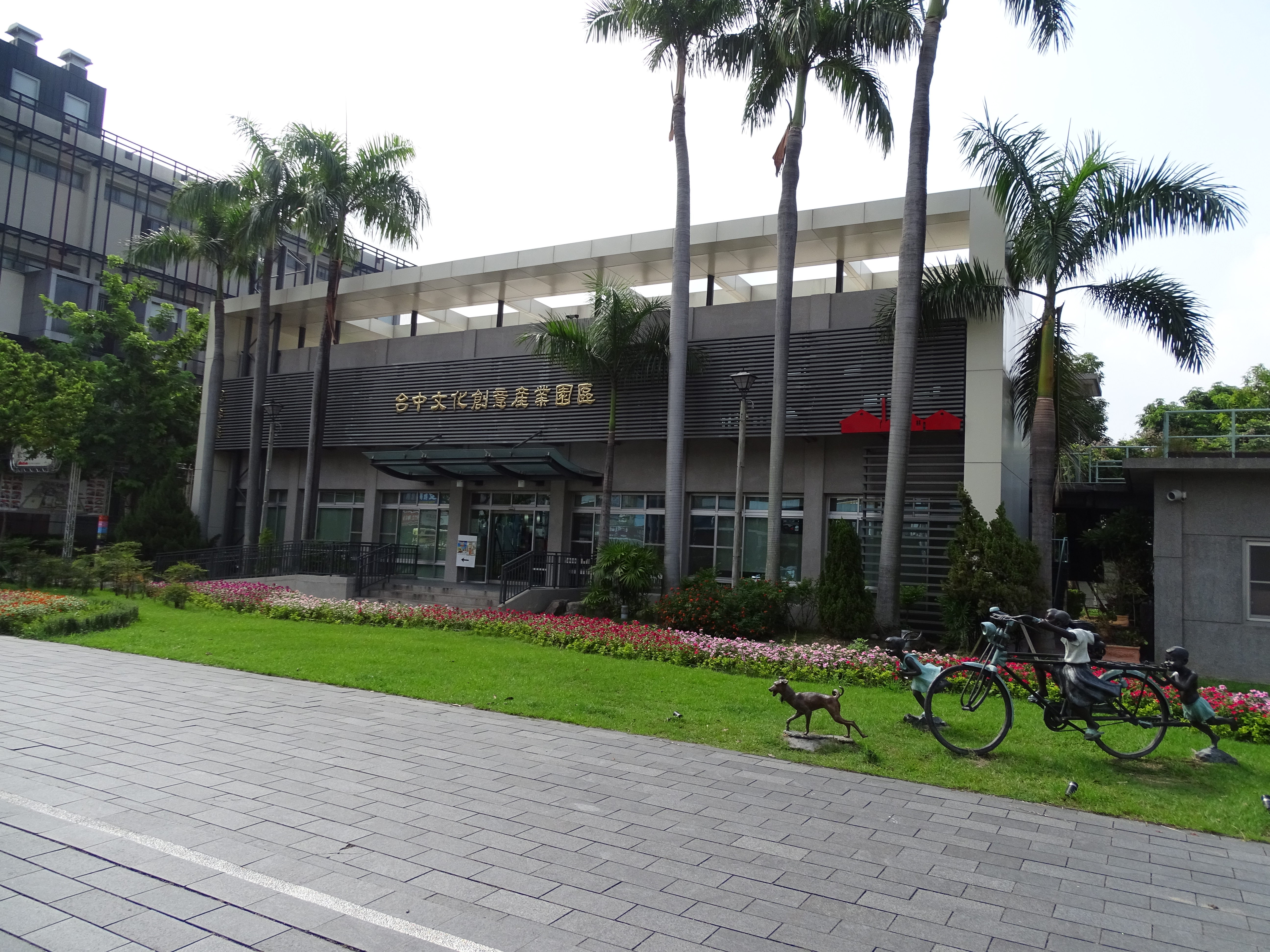 臺中文化創意產業園區思源樓，現用途為文化部文化資產局行政中心。